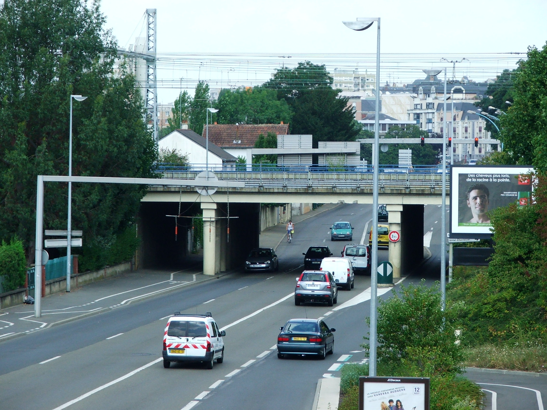 Le Boulevard Demorieux au Mans, dans le sens intérieur, permettant d'accéder à la Gare Nord et au centre-ville.